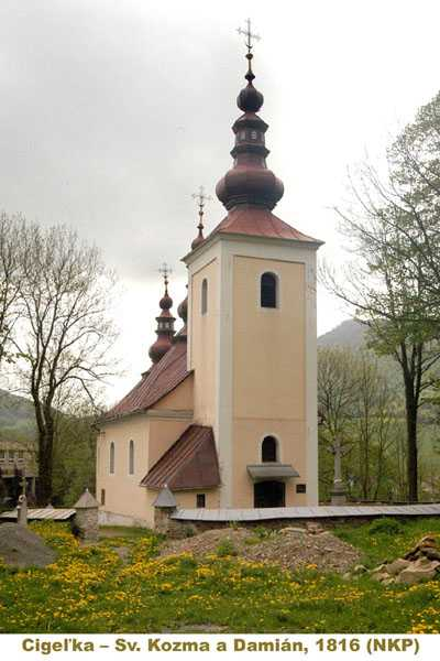 Church Sv.Kozma a Damian-Cigelka(Slovakia)